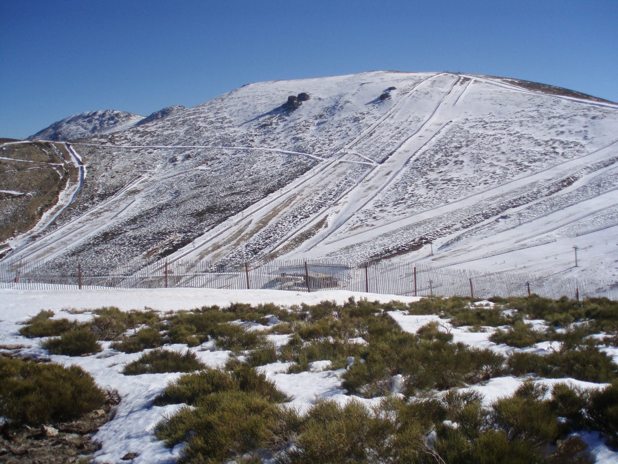 Cerro de Valdemartín visto desde la Loma del Norguego (Sierra de Guadarrama, España).